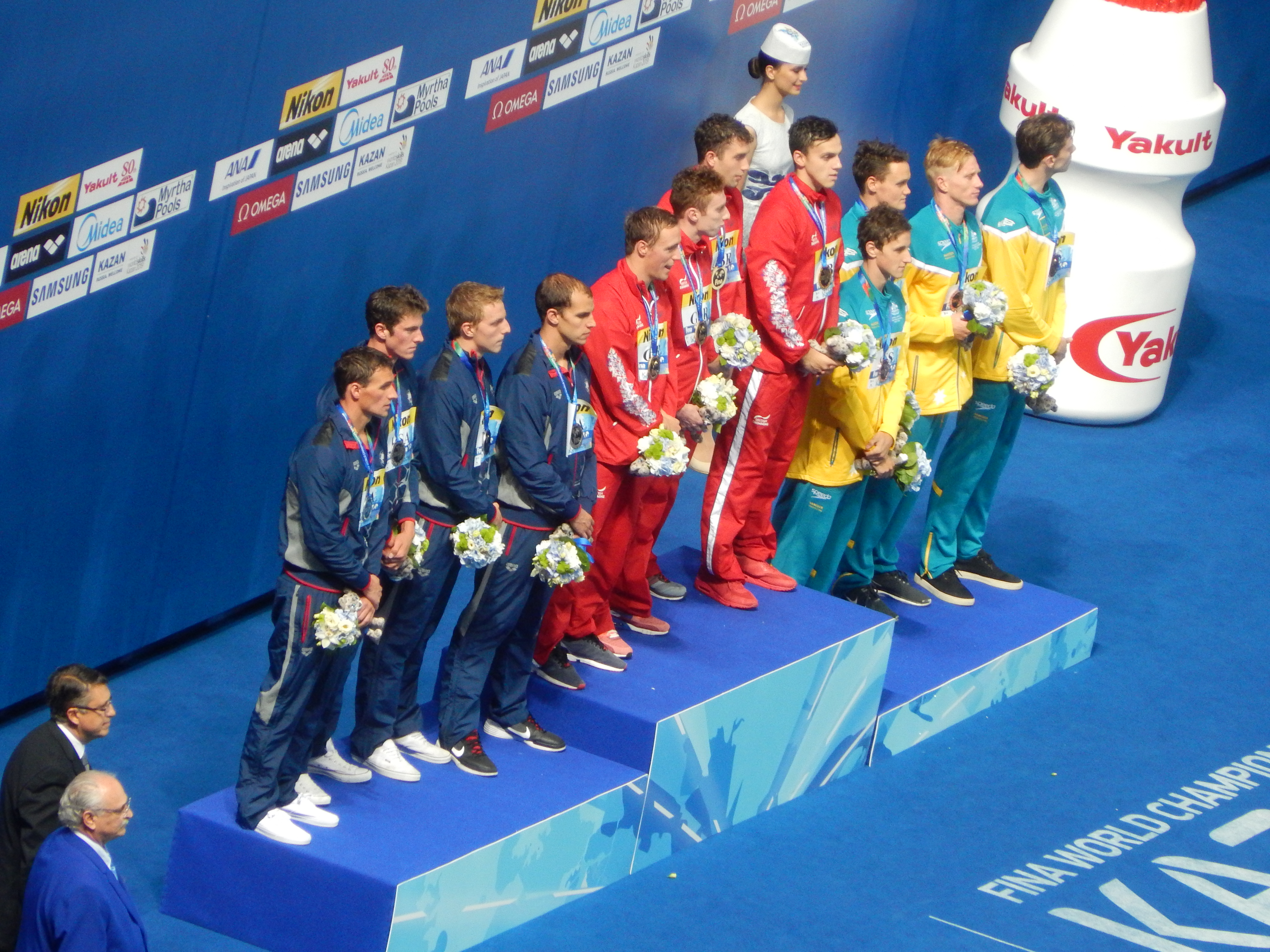 Церемония награждения мужской эстафеты вольным стилем 4 по 200 метров на чемпионате мира 2015 года в Казани